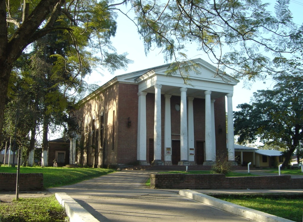 Parroquia San Pablo Apostol en la localidad de San Pablo, Departamento Lules (Tucumán)